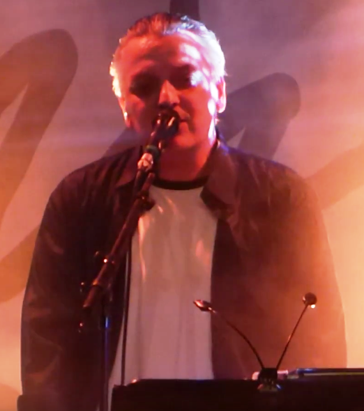 Der deutsche Sänger Peter Heppner auf seiner "30 Years of Heppner Tour" in der Kulturfabrik Krefeld/Deutschland am 18. November 2017.